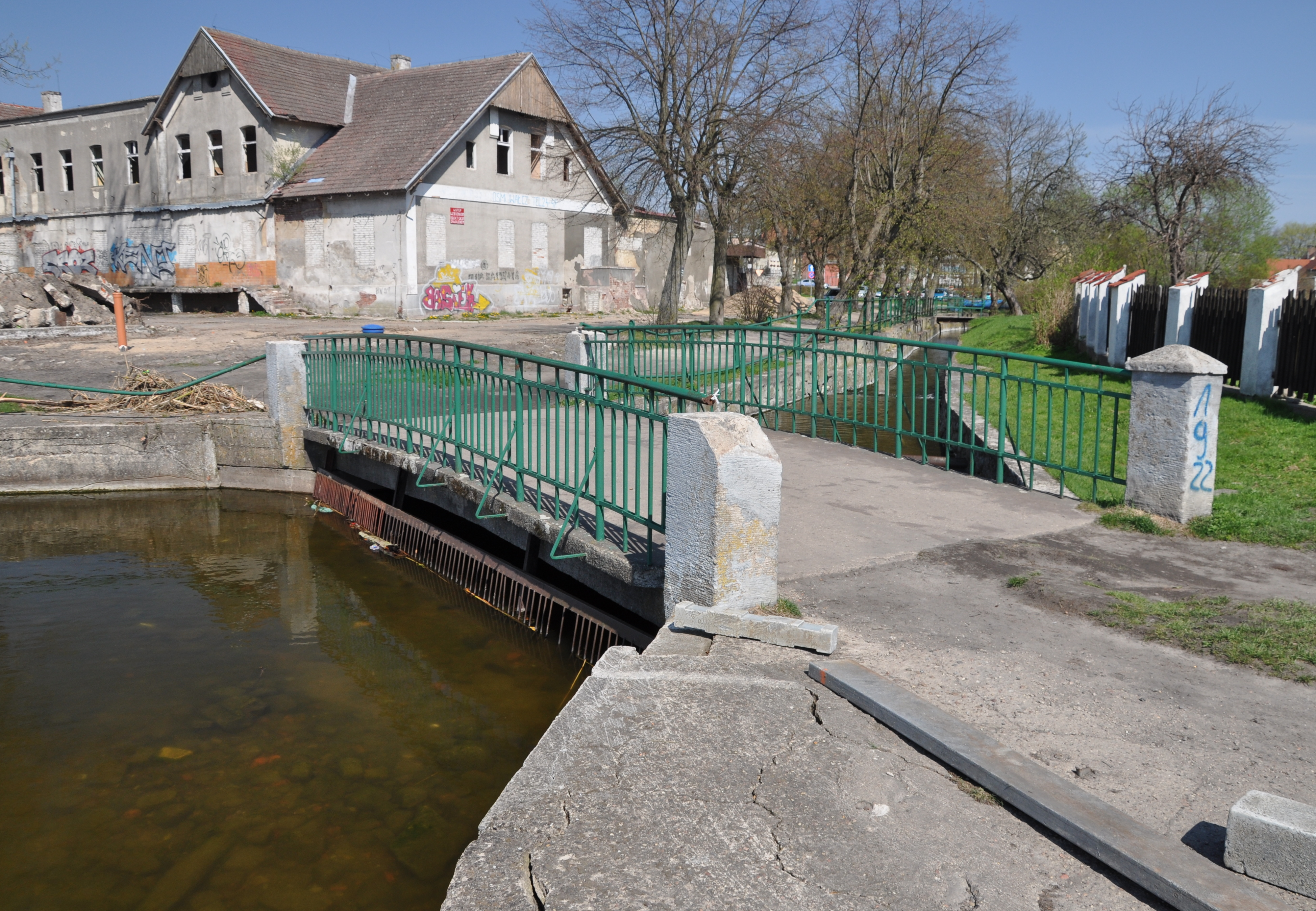 Upust na jeziorze Raduń do rzeki Żydówki, w Wałczu